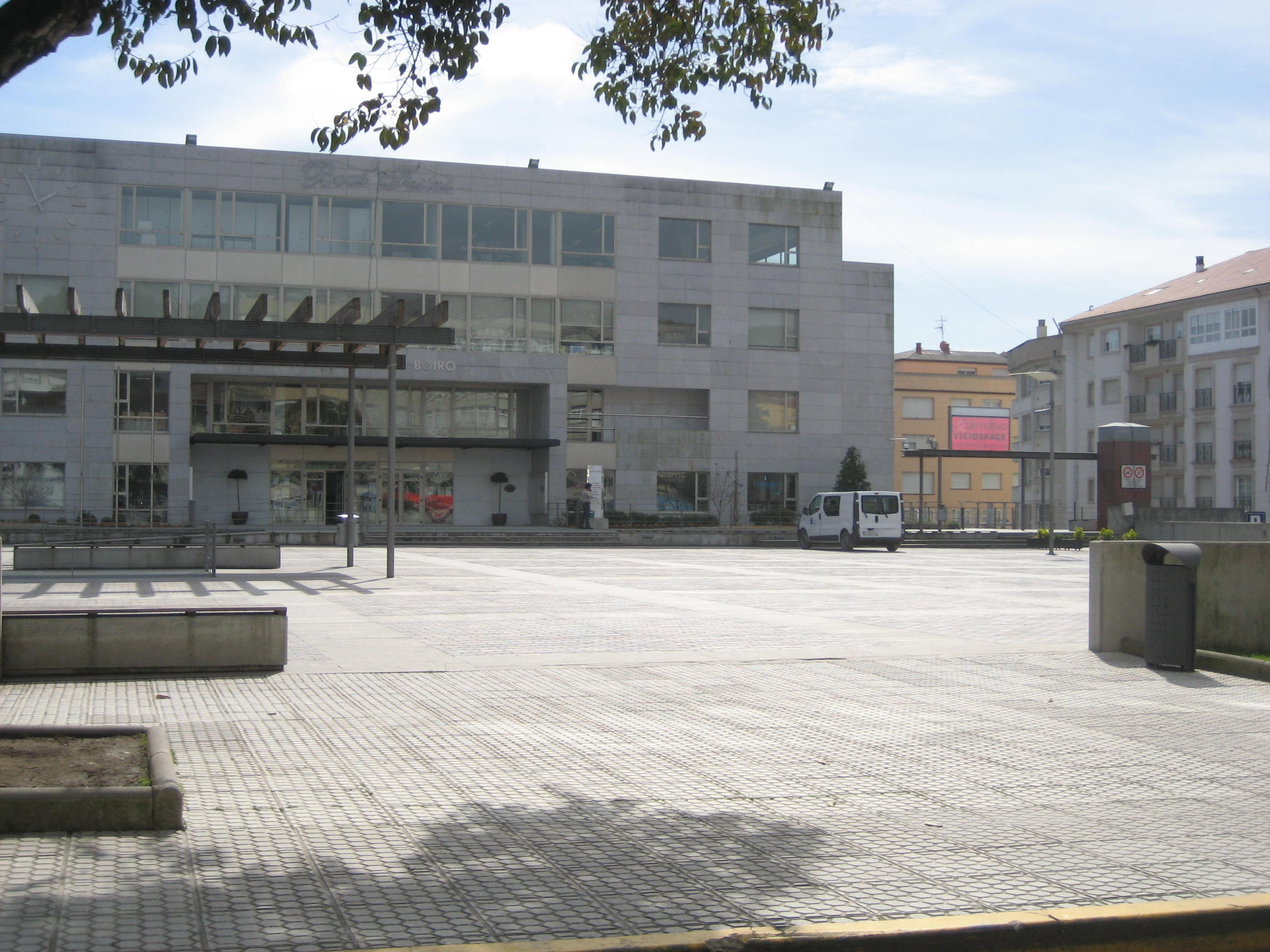 Casa do concello de Boiro.